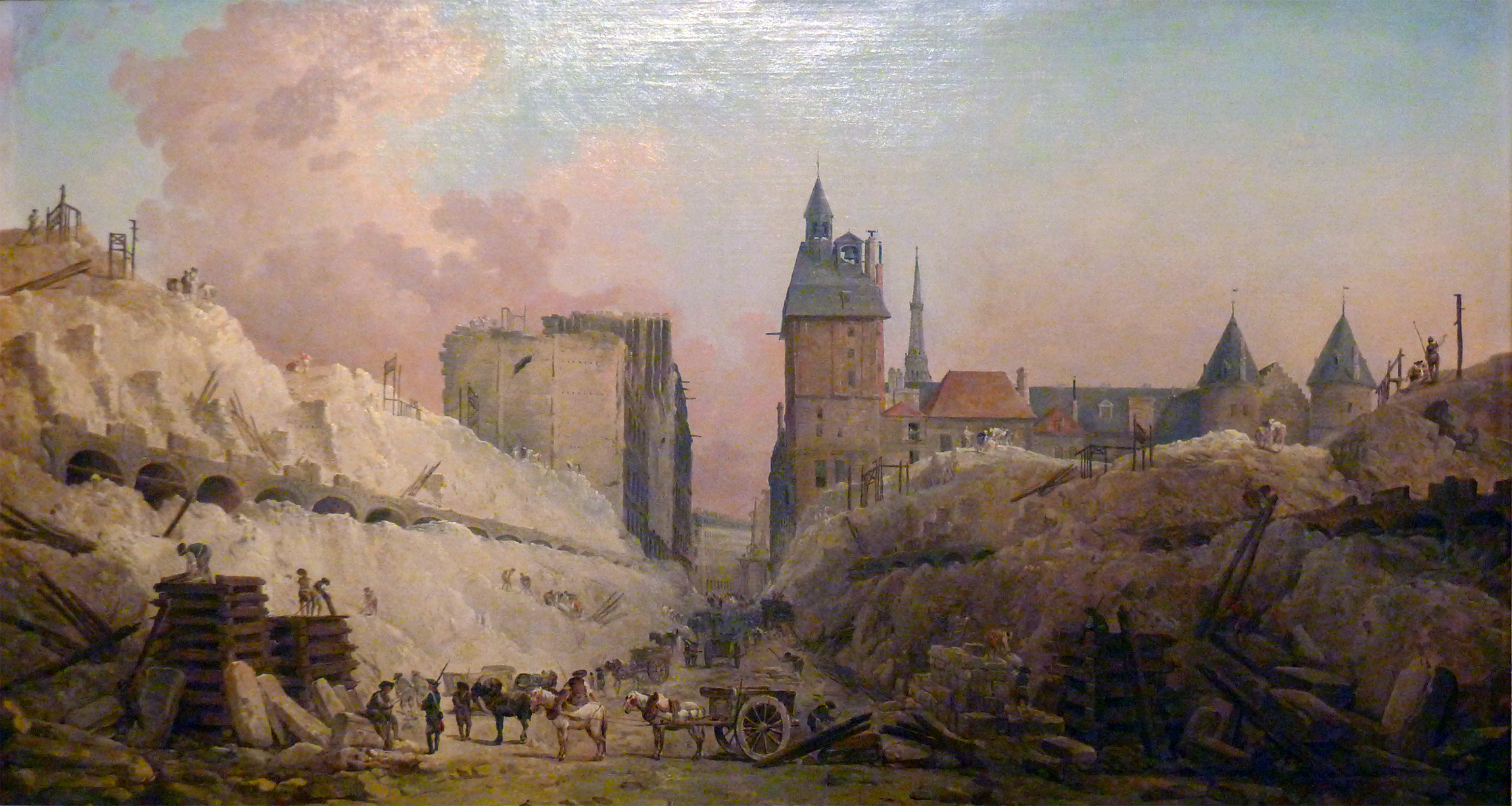 Travaux de démolition des maisons du Pont-au-Change en 1788 ; en arrière plan, la Conciergerie.